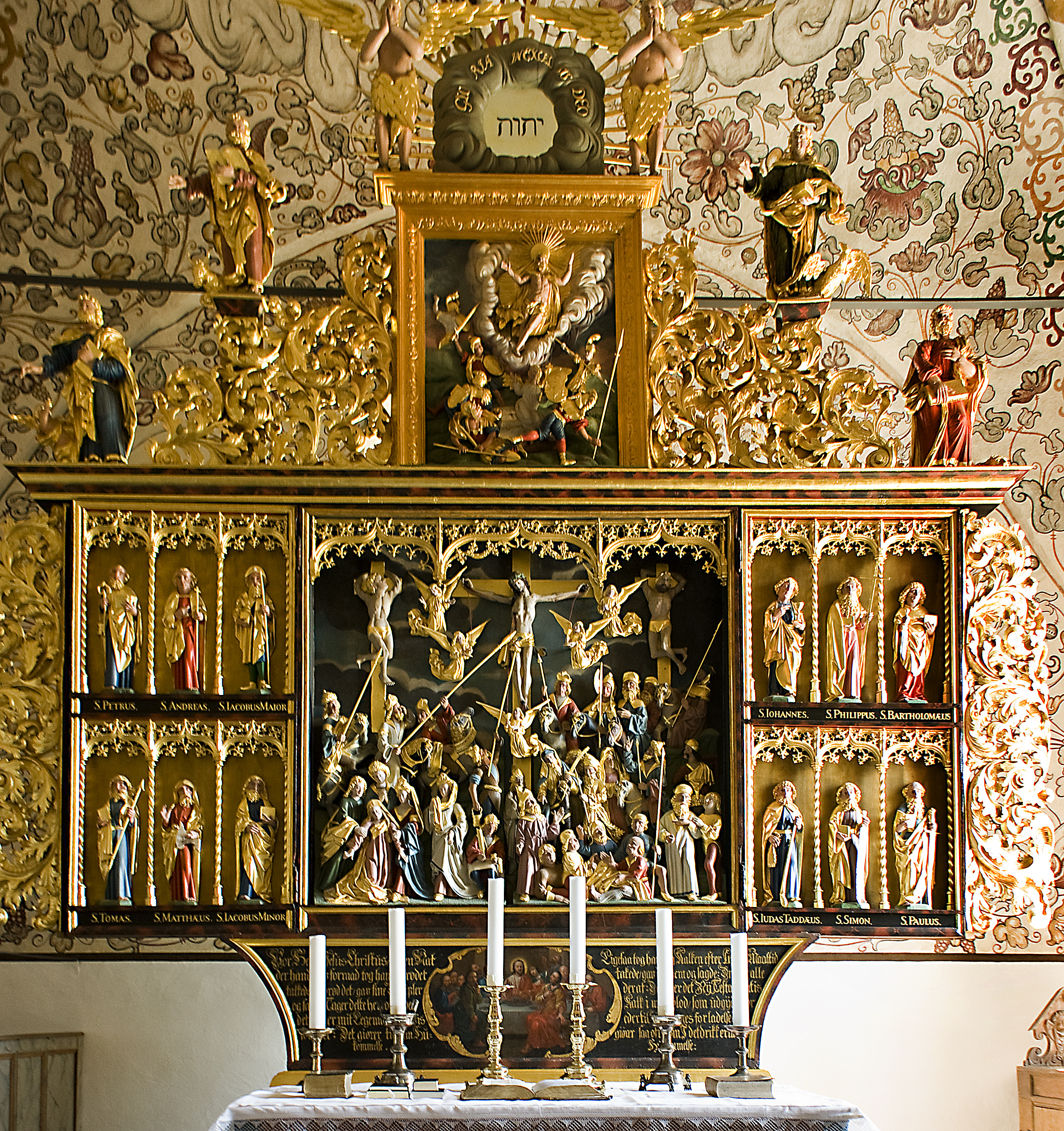 Detalje alter Møgeltønder Kirke